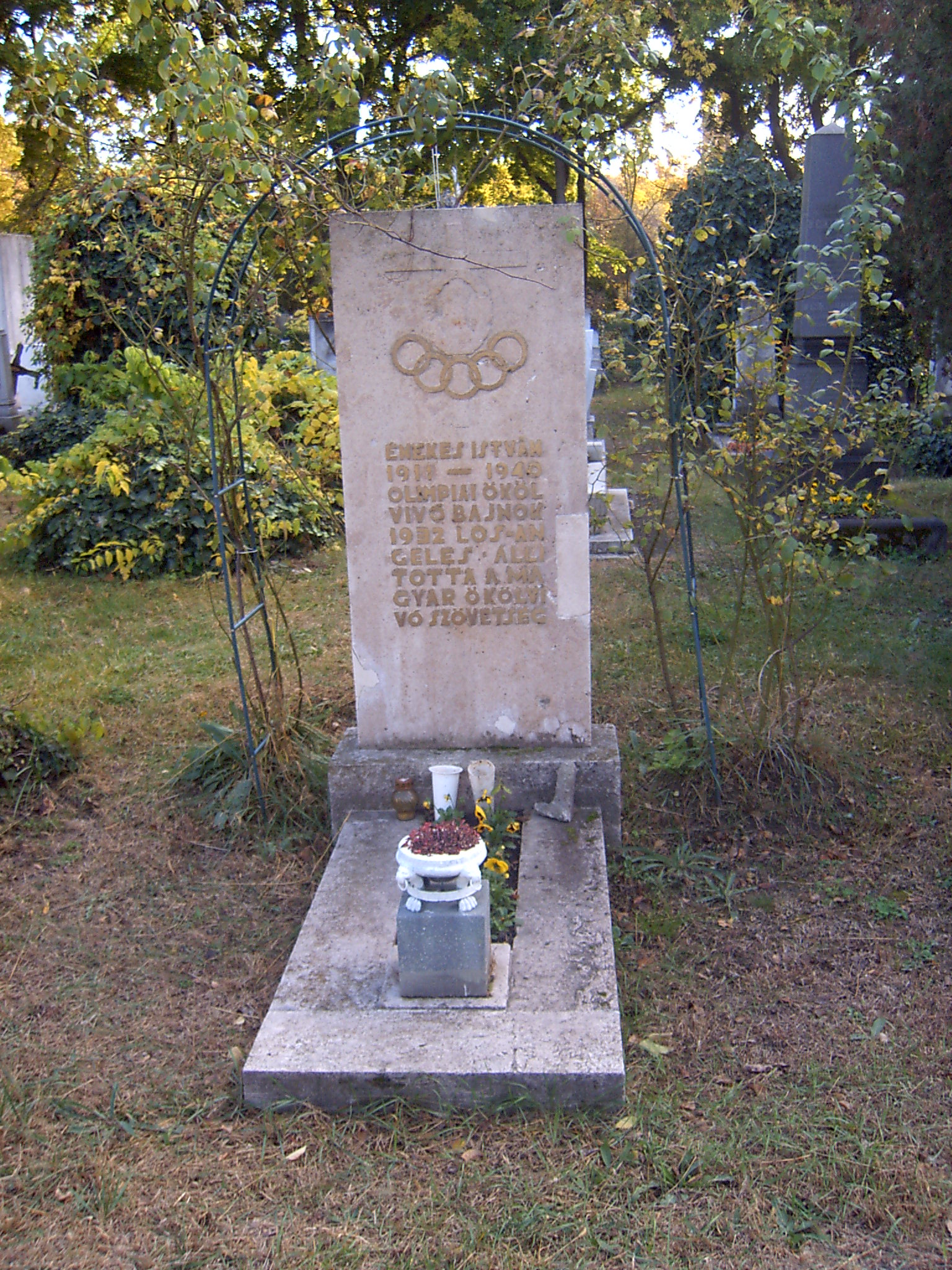 Grab von István Énekes